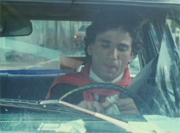 אבי אבוטבול קידר - הצלם שנכלא במכוניתו 3